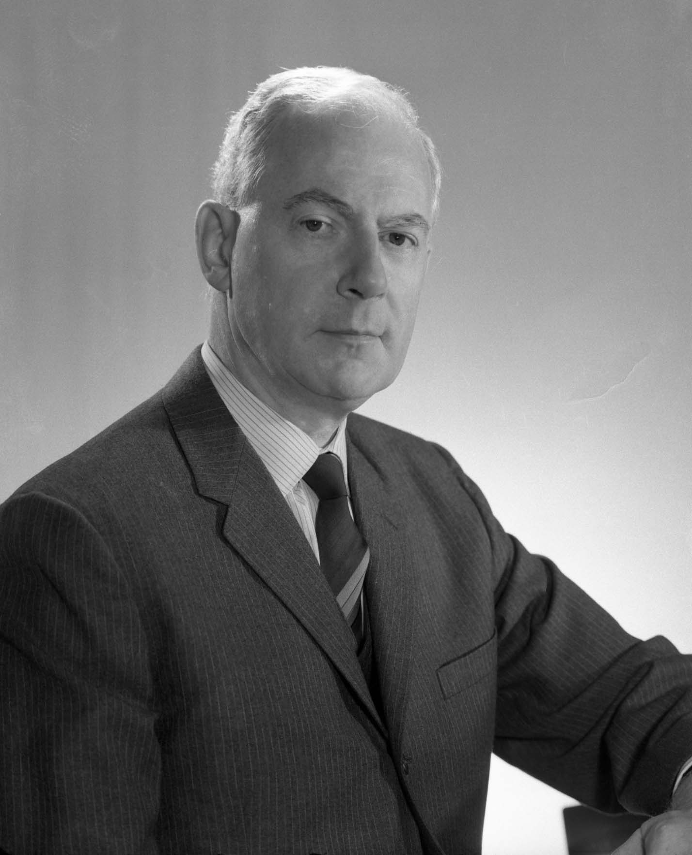 Portrait photographique de Roger Gaudry.